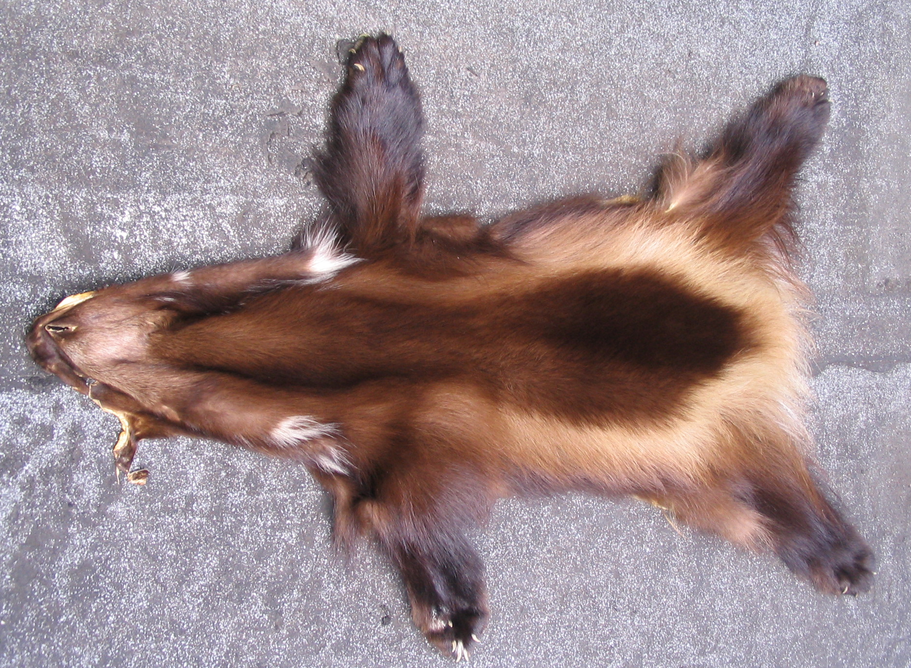 Vielfraßfell. Gesehen bei Herhold Pelze, Wiesbaden.